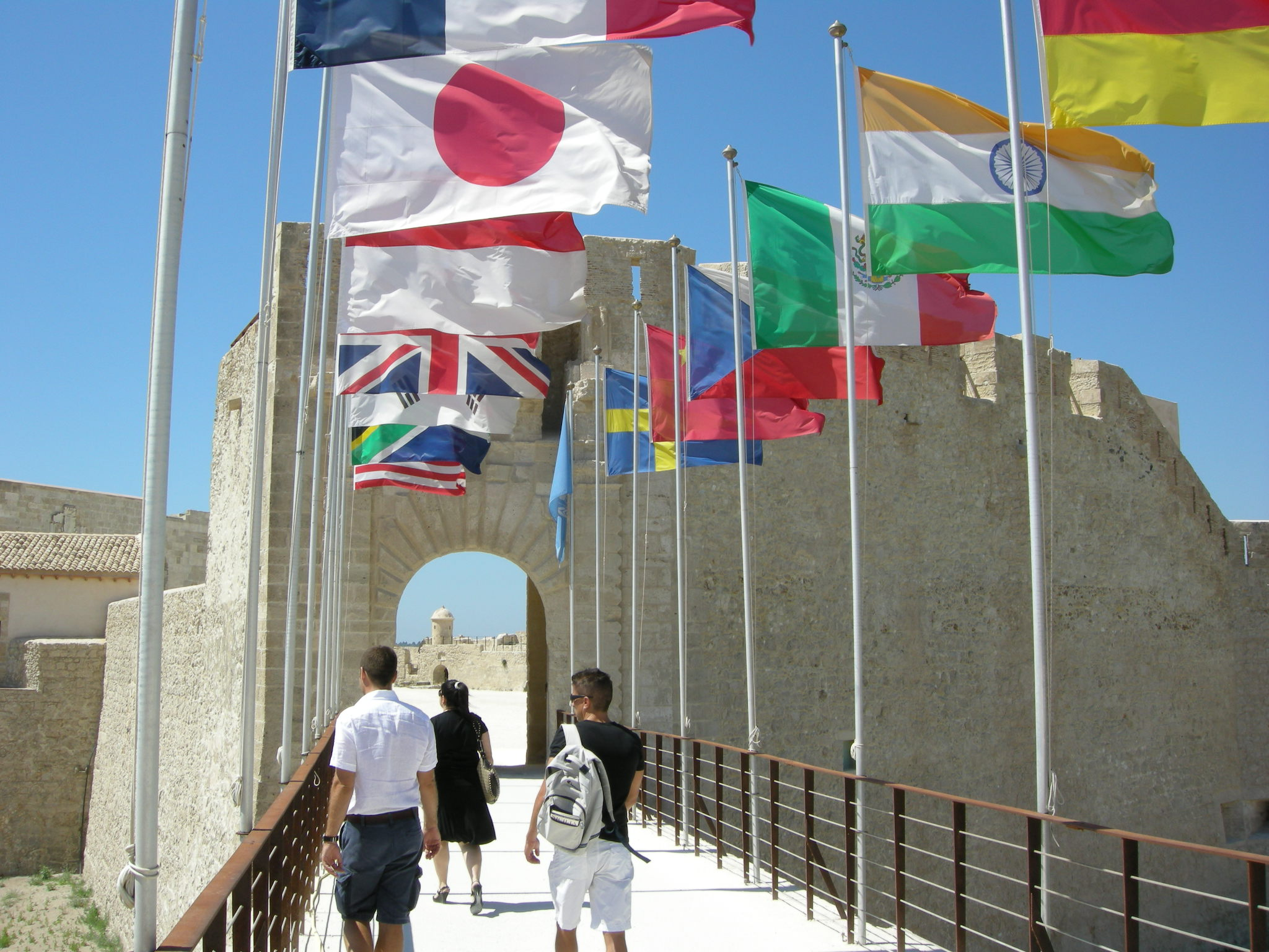 Ortigia, castello maniace